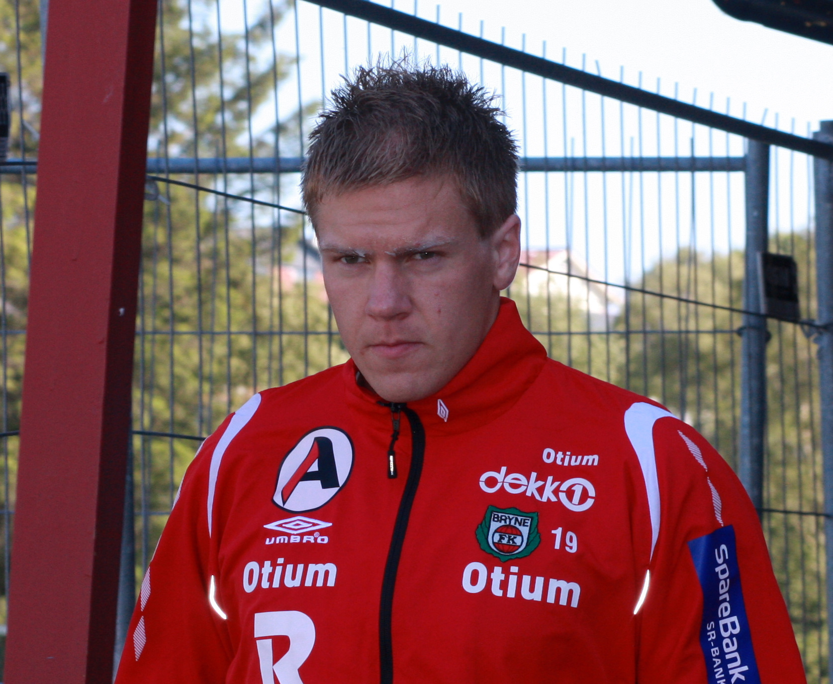 Karl Morten Håland at Bryne stadion